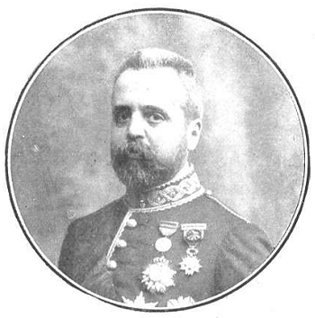 Retrato de José Sánchez Guerra, obra del fotógrafo Kaulak, recogido en la revista española Mundo gráfico.